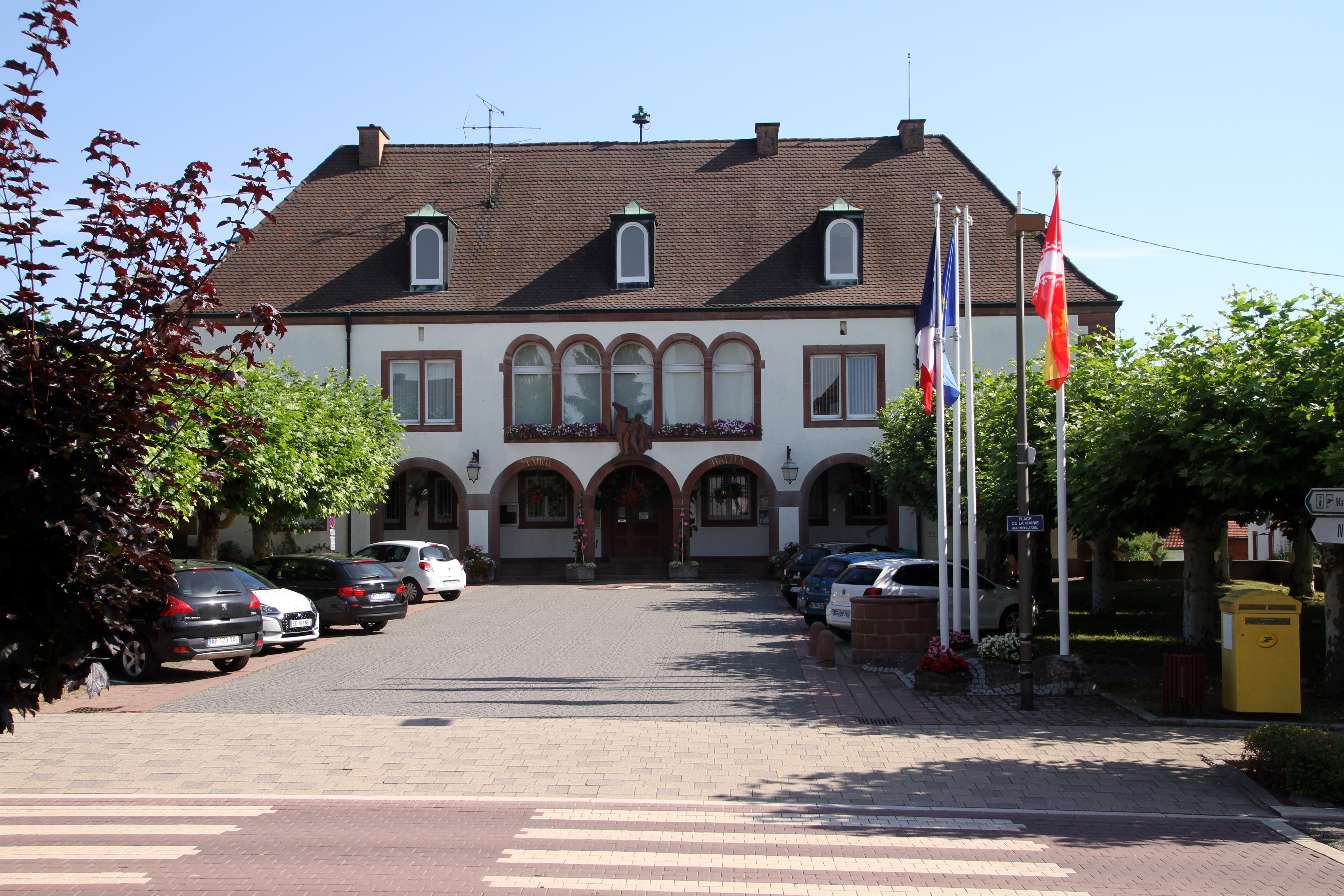 Hatten (Bas-Rhin)